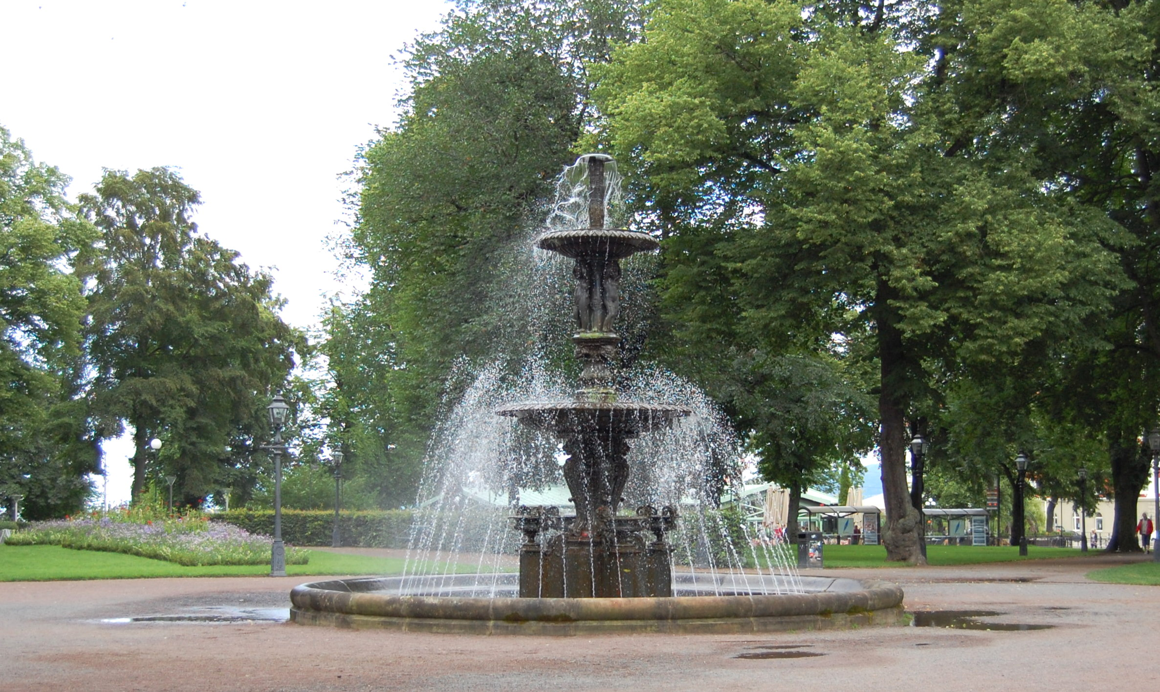 Brunnen im Radhusenparken in Jönköping